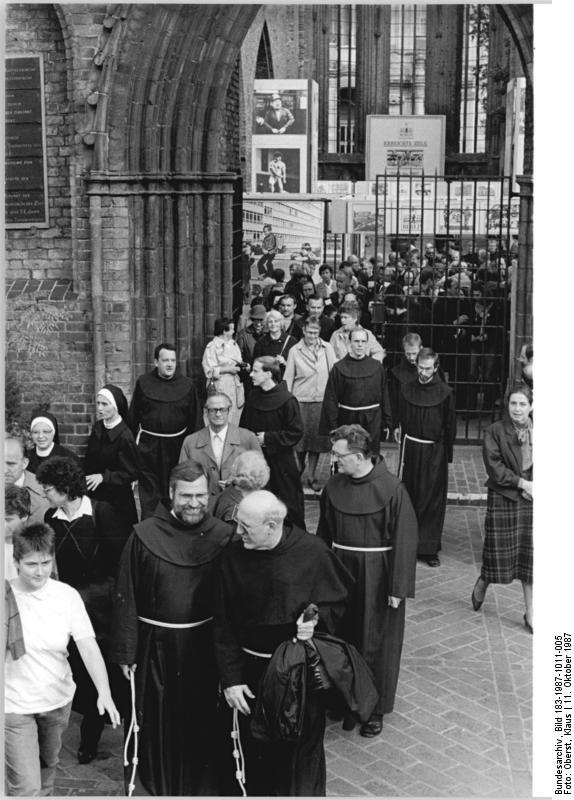 ADN-ZB Oberst 11.10.87 Berlin: Jubiläum. Nach einem Festgottesdienst in der Hedwigkirche begaben sich etwa 120 Patres der Franziskaner und Schwestern aus mehreren europäischen Ländern zu einer Gedenkfeier in die Ruine der Franziskanerkirche. Dort hörten sie ein geistliches Wort des Ordensoberen, John Vaughn, über franziskanisches Selbstverständnis heute und hielten ein Friedensgebet. Die Franziskaner feierten in Berlin den Beginn ihres Wirkens vor fast 750 Jahren in dieser Stadt.